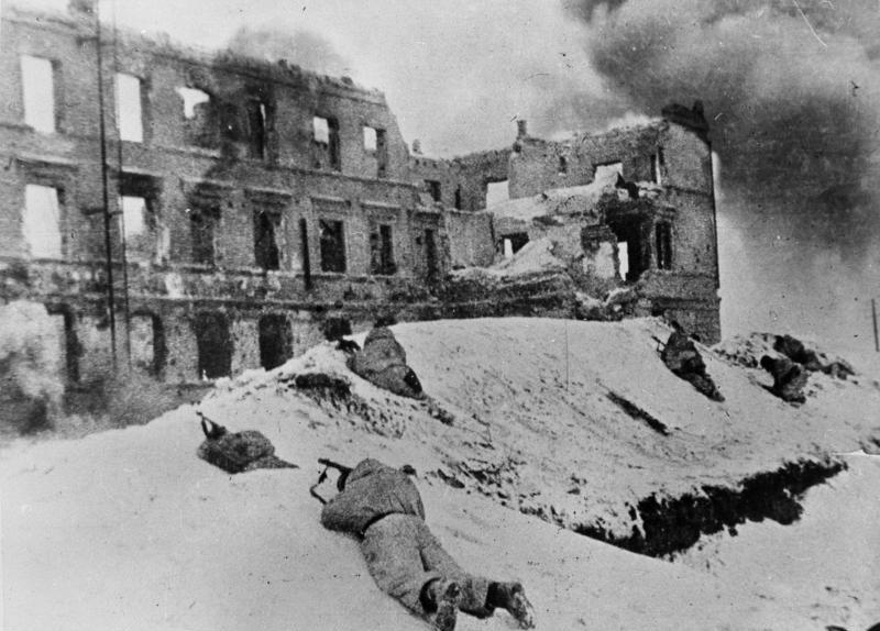 Russland, Kesselschlacht Stalingrad ADN-ZB/Tass/ II. Weltkrieg 1939-45 Die Stalingrader Schlacht begann im Juli 1942. In erbitterten, beiderseits verlustreichen Kämpfen wehrte die Rote Armee das weitere Vordringen der faschistischen Truppen ab. Während der sowjetischen Gegenoffensive im November 1942 wurden über 300 000 Mann eingeschlossen. Die Reste dieser Verbände, etwa 91 000 Mann, kapitulierten am 31.1. und 2.2.1943 Stalingrad im Januar 1943 - um jede Ruine müssen die sowjetischen Soldaten erbittert kämpfen.